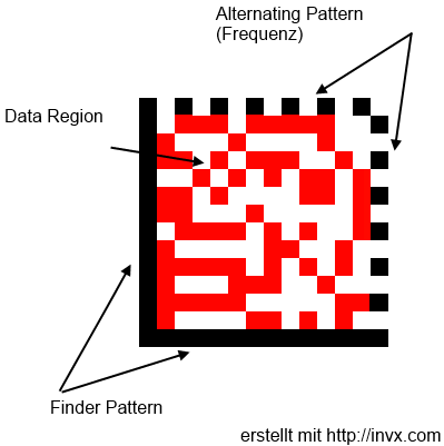 Data Matrix Code 14x14 Size